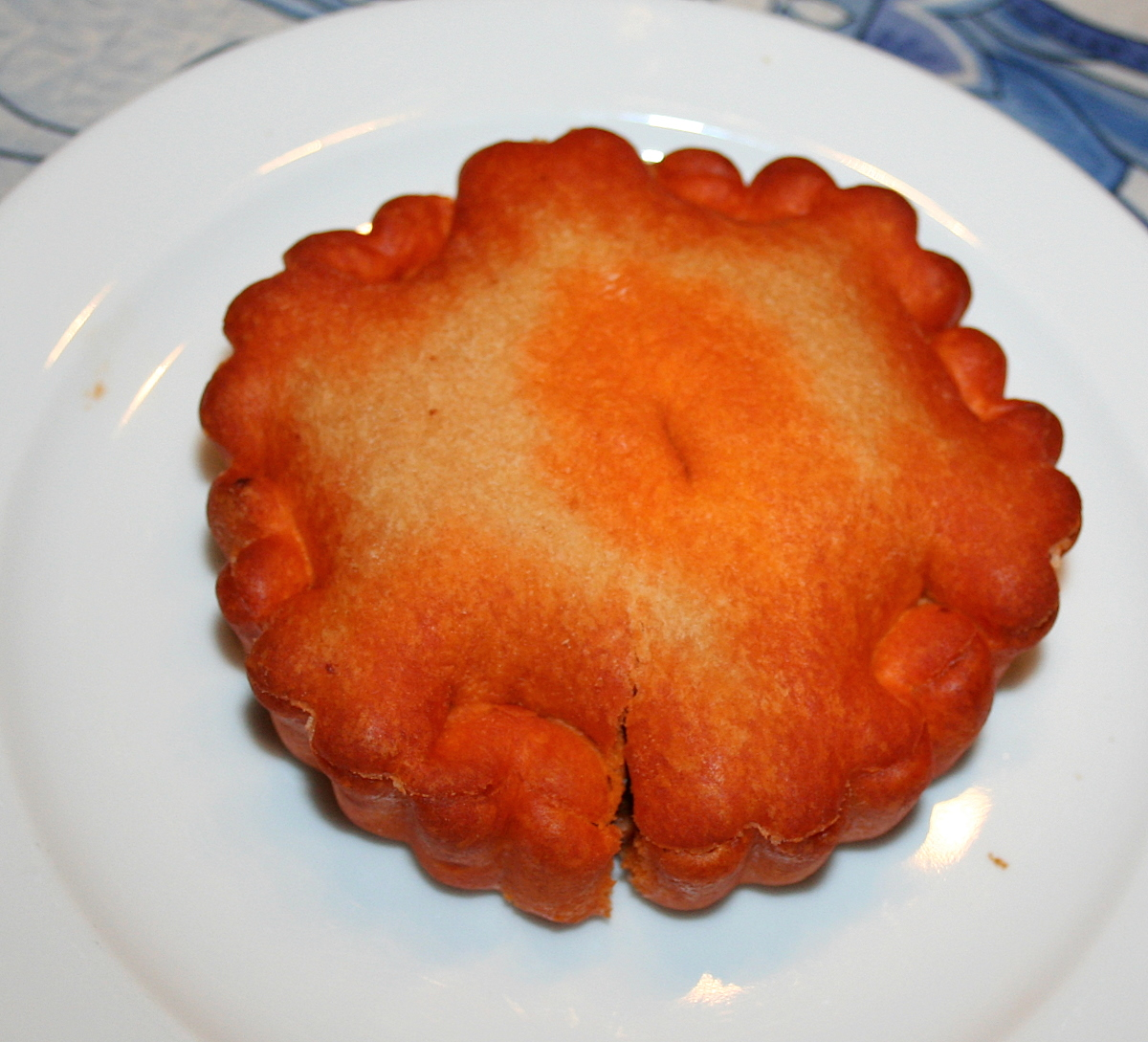 Tielle sétoise vue de haut.